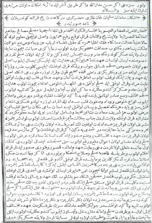 1547 tarihli Edirne Antlaşması'nın metni, 1. sayfa.